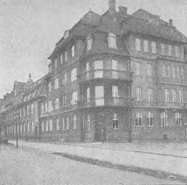 Budynek Gimnazjum Polskiego w Bytomiu, obecnie przy Alei Legionów 49